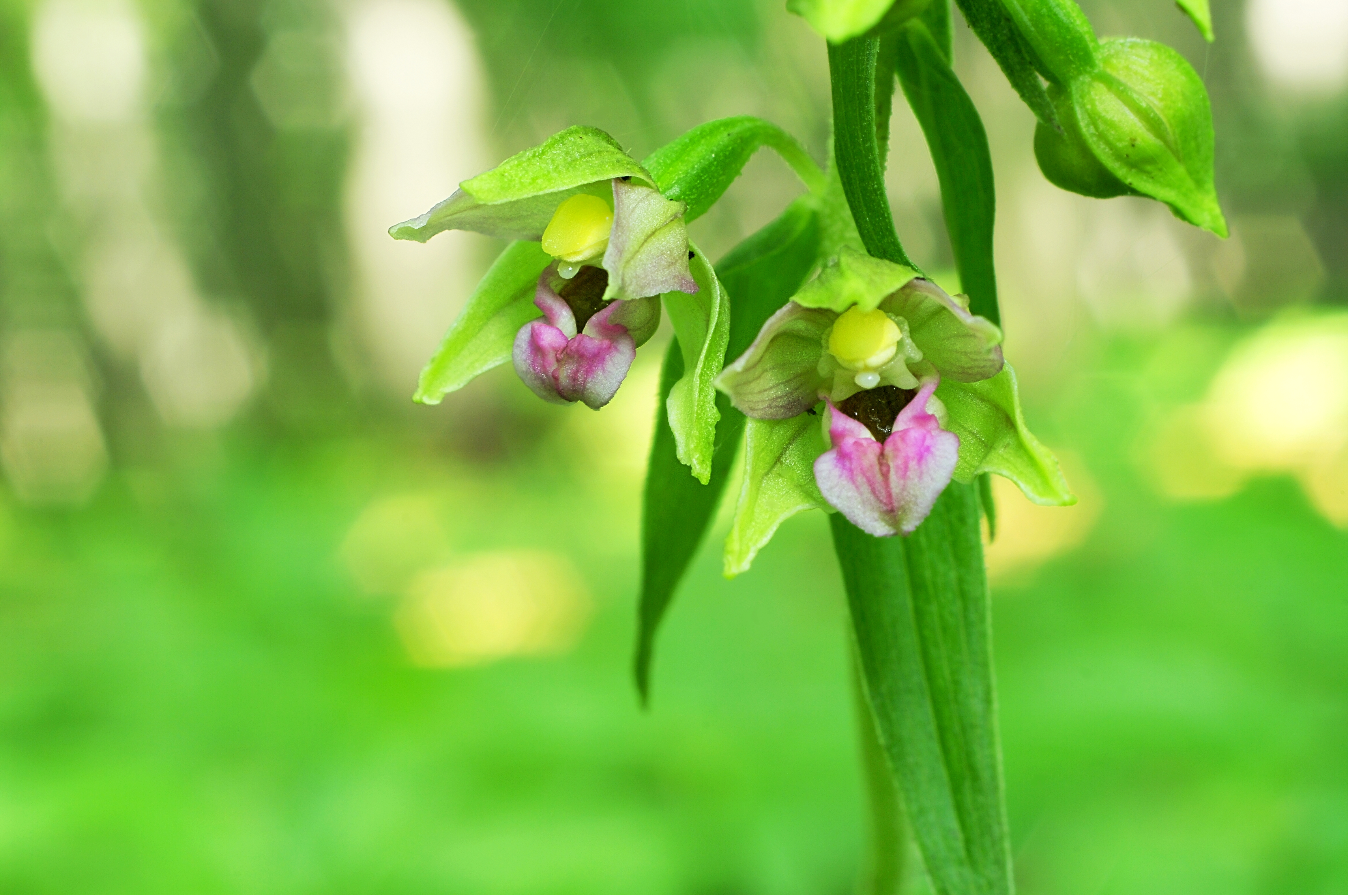 Kruszczyk szerokolistny (Epipactis helleborine (L.) Crantz), pierścienie pośrednie.